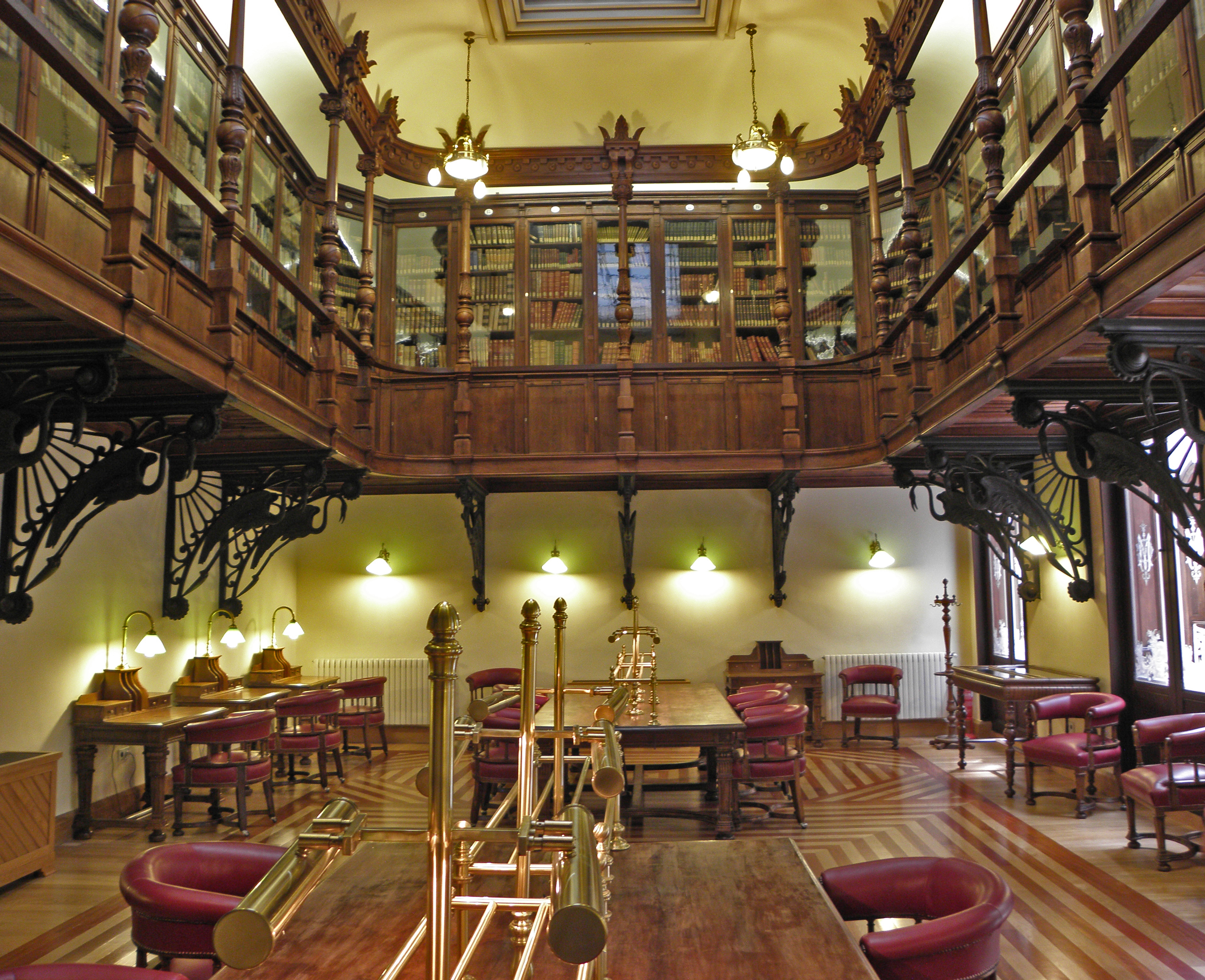 Biblioteca del casino de Murcia